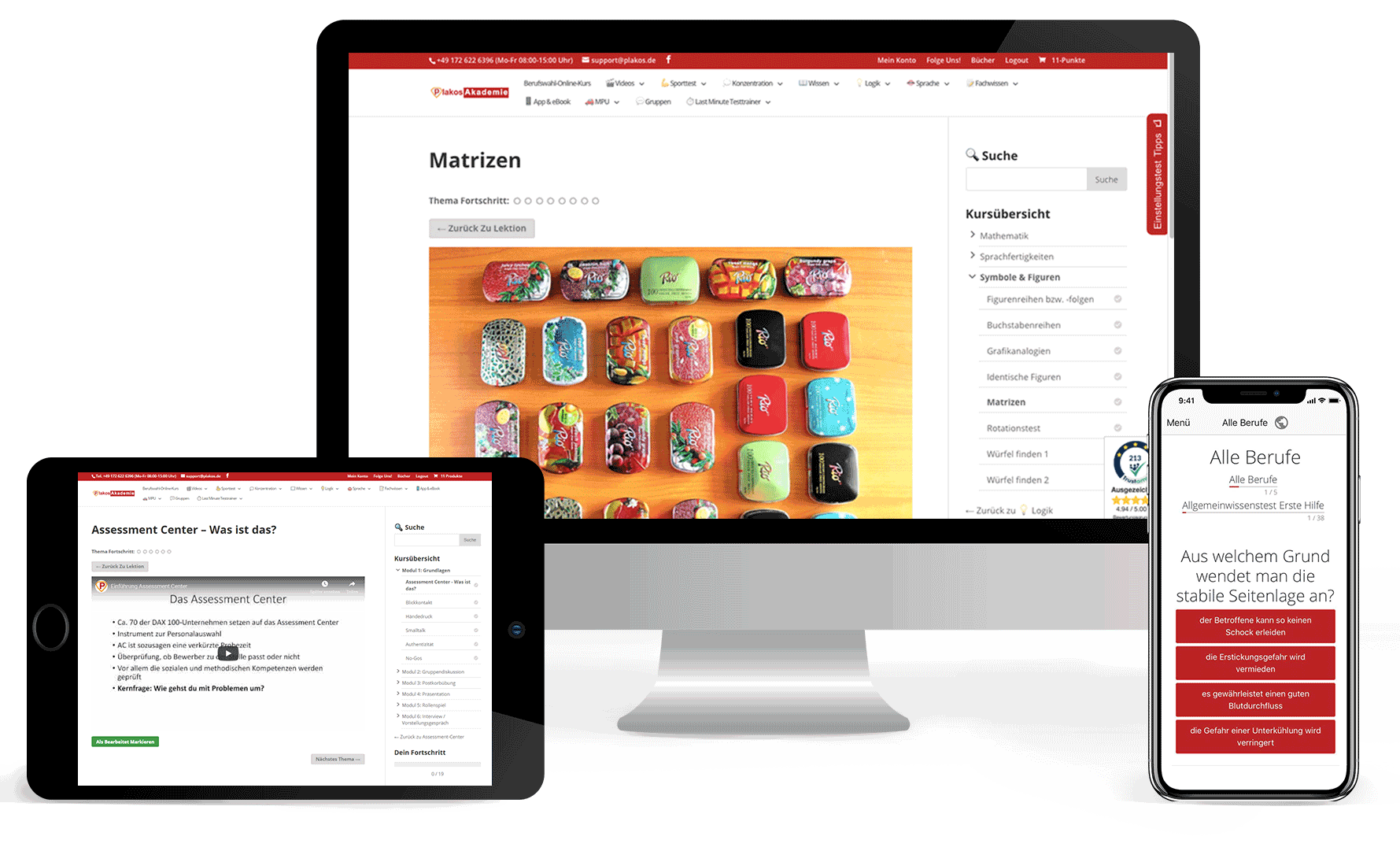 Desktop Mockup der Plakos App